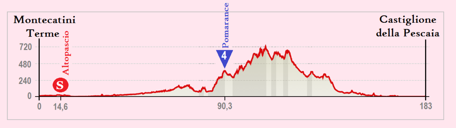 Perfil de la 6.ª etapa del Giro de Italia 2015